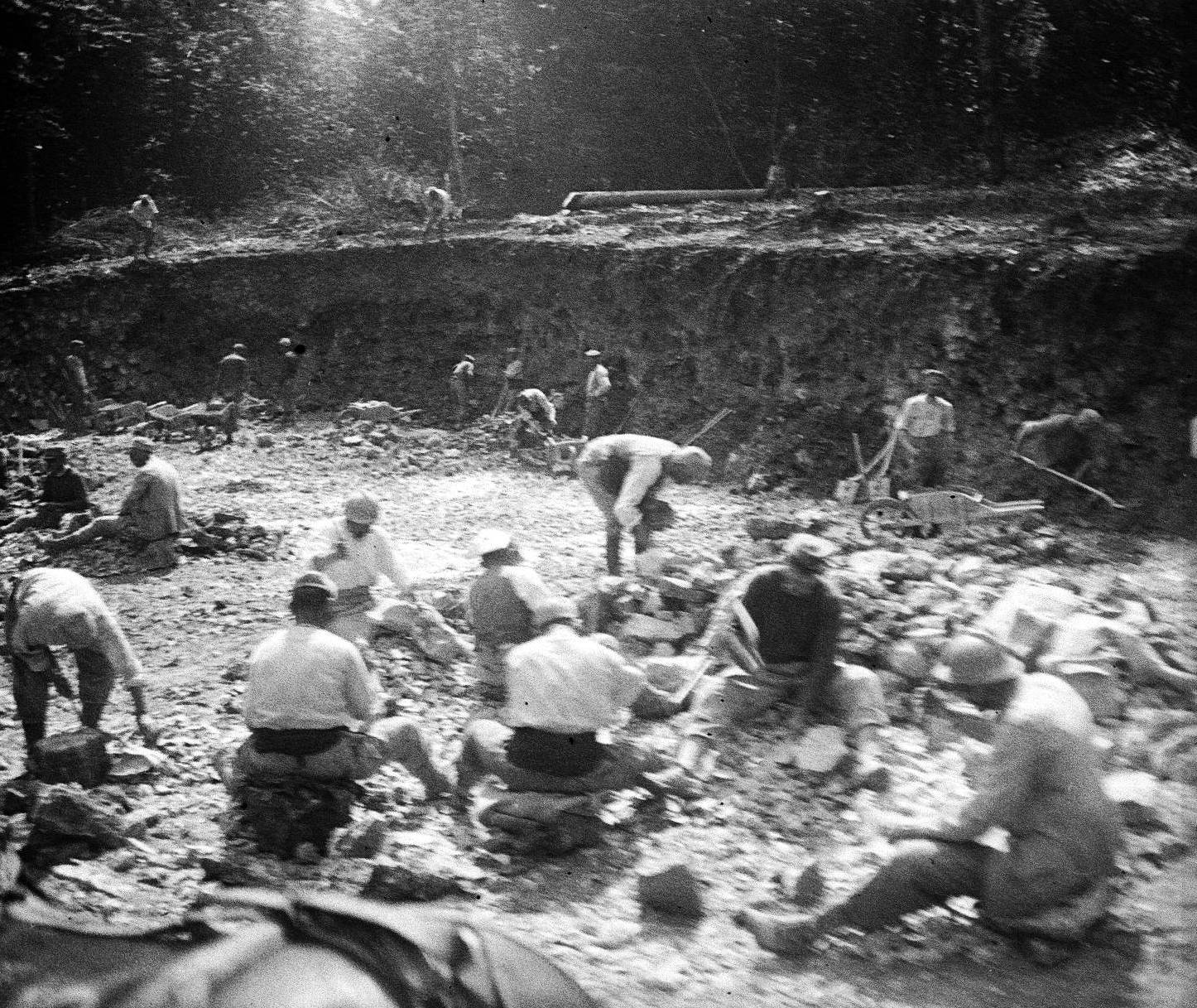 Prisonniers allemands en corvée dans une carrière près de Souilly (Meuse). 1916. Guerre 1914-1918.